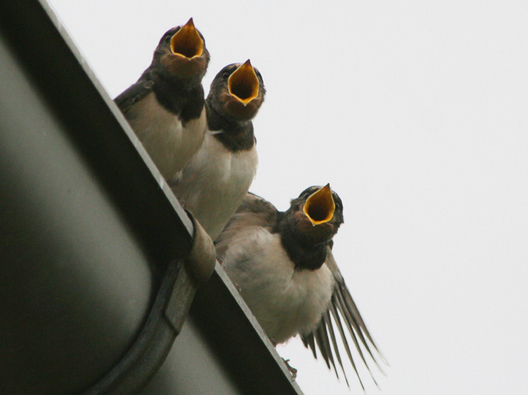 Schwalben (Hirundo rustica), Jungvogel, Cronskamp, Nordwestmecklenburg